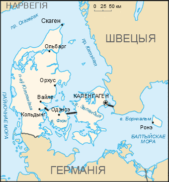 Карта ДанііБеларуская (тарашкевіца): Мапа Даніі